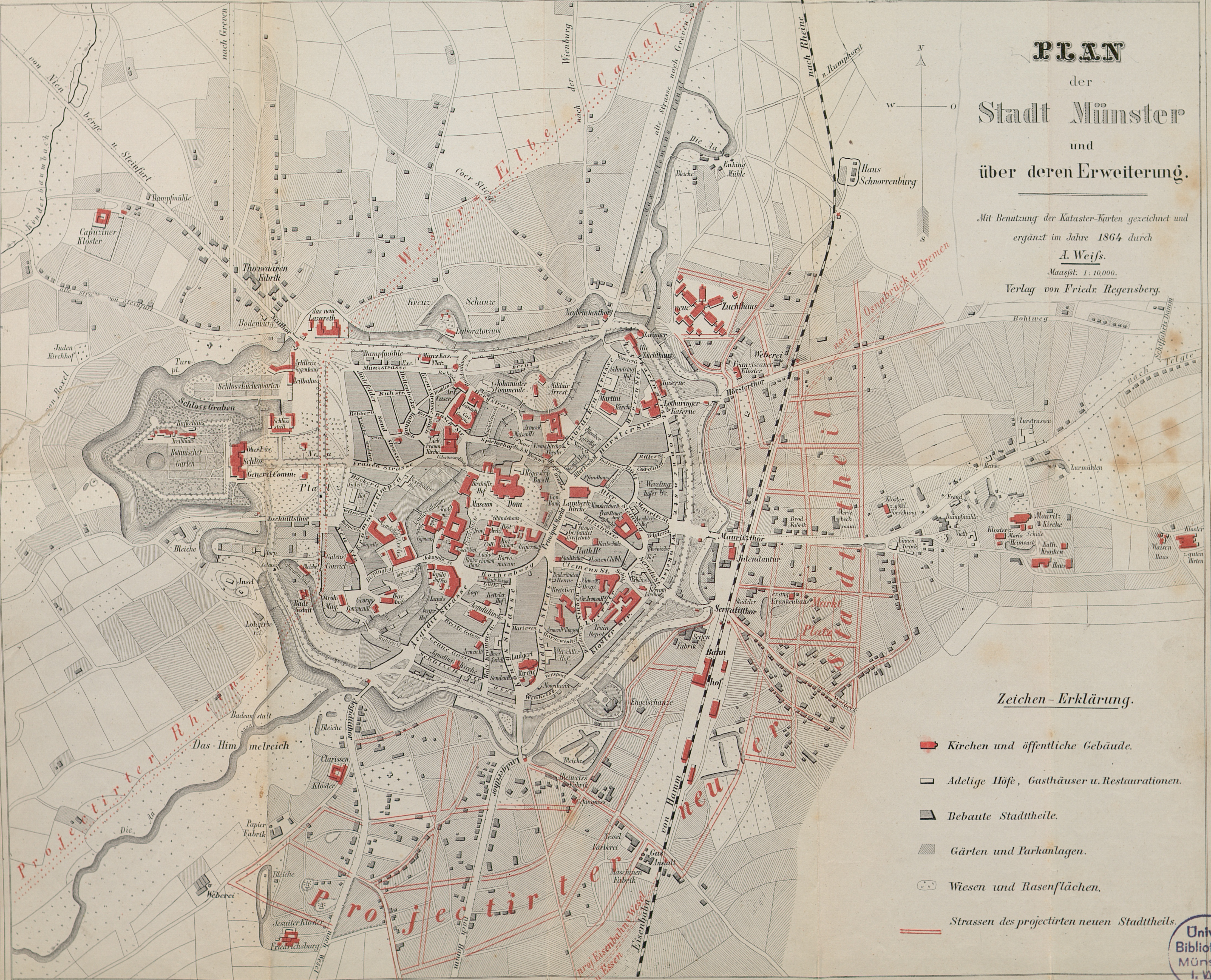 Plan der Stadt Münster und über deren Erweiterung.